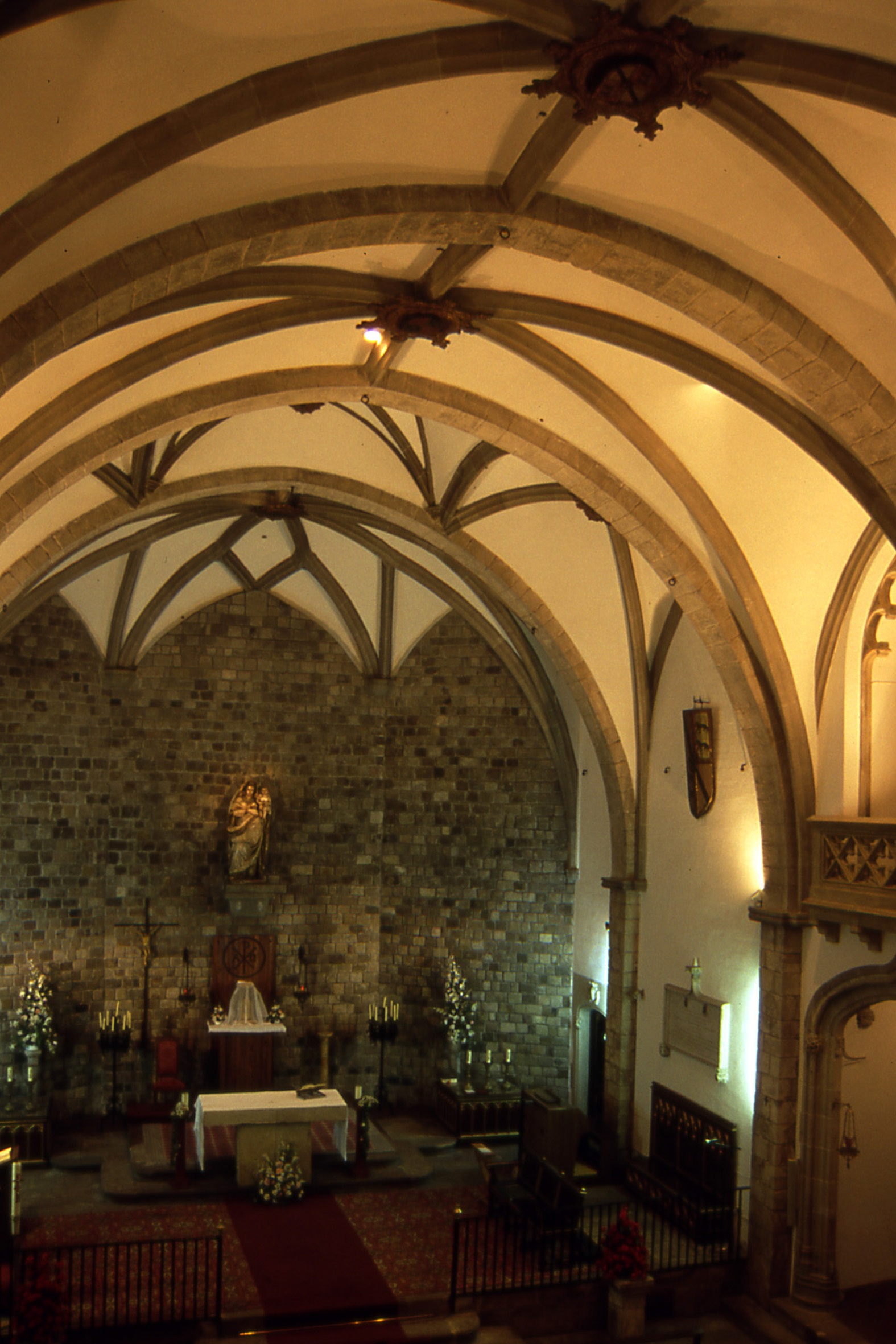 Barcelona. Església conventual de la casa del Temple, reformada el segle XVI pels Requesens. Any 2000.